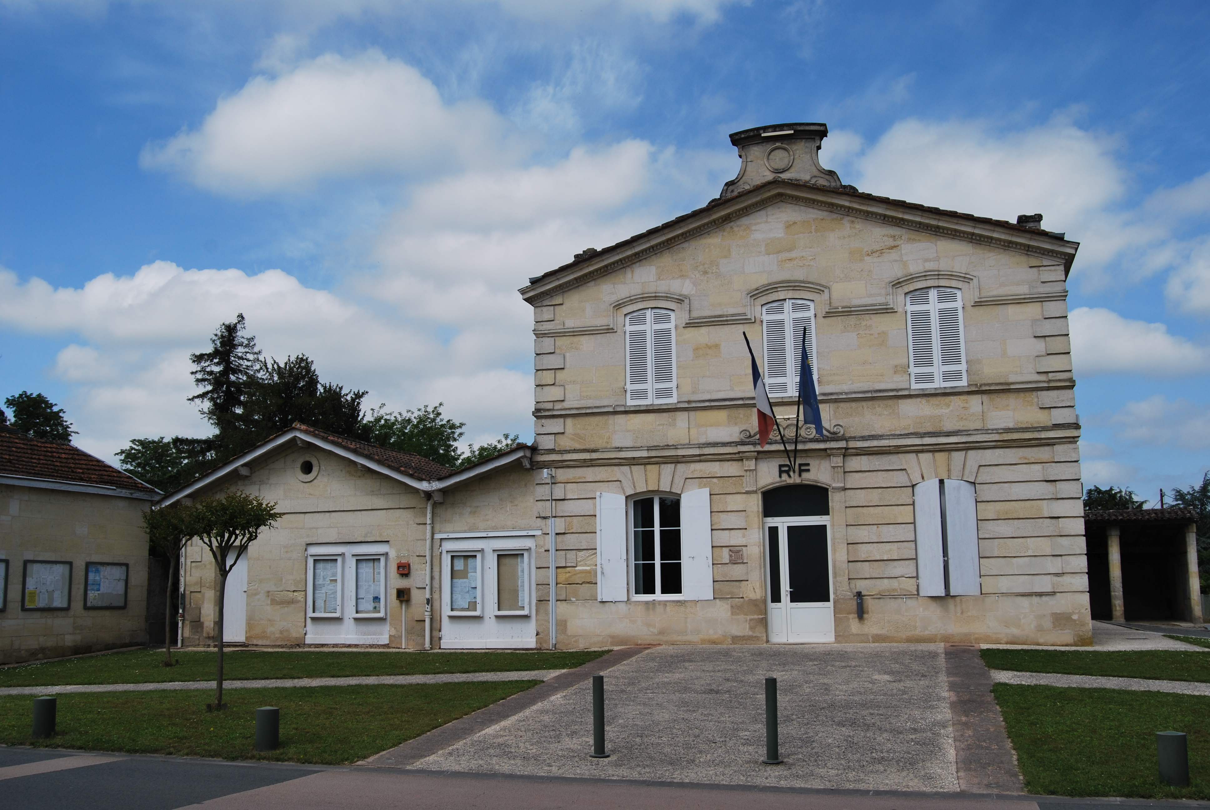 Genissac Mairie